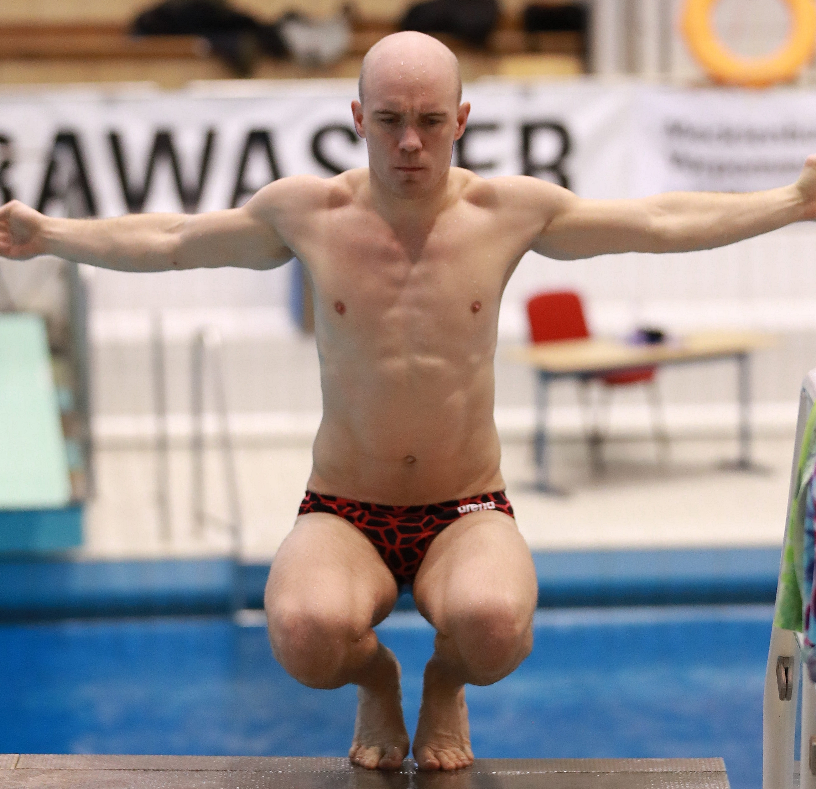 Training am Vormittag des 17. Februar bei den Internationalen Deutschen Hallenmeisterschaften im Wasserspringen Offene Klassen und Junioren. Abgebildet: Florian Fandler.